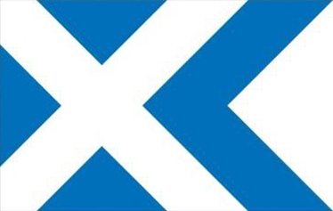 Ruhnu valla lipp